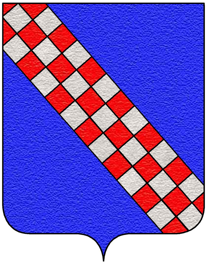 Stemma della famiglia Falletti